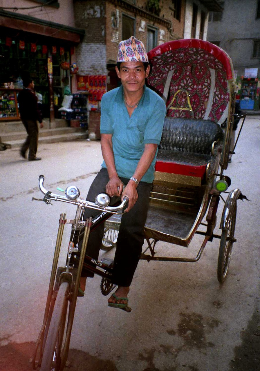 サイクルリクシャー